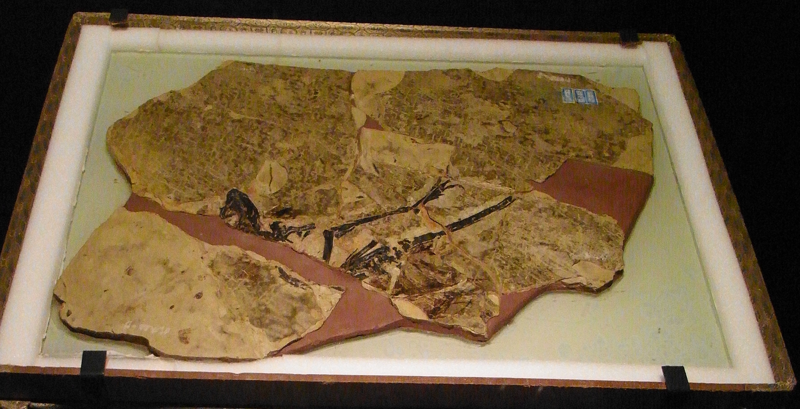 日本初公開！ 読みづらい！